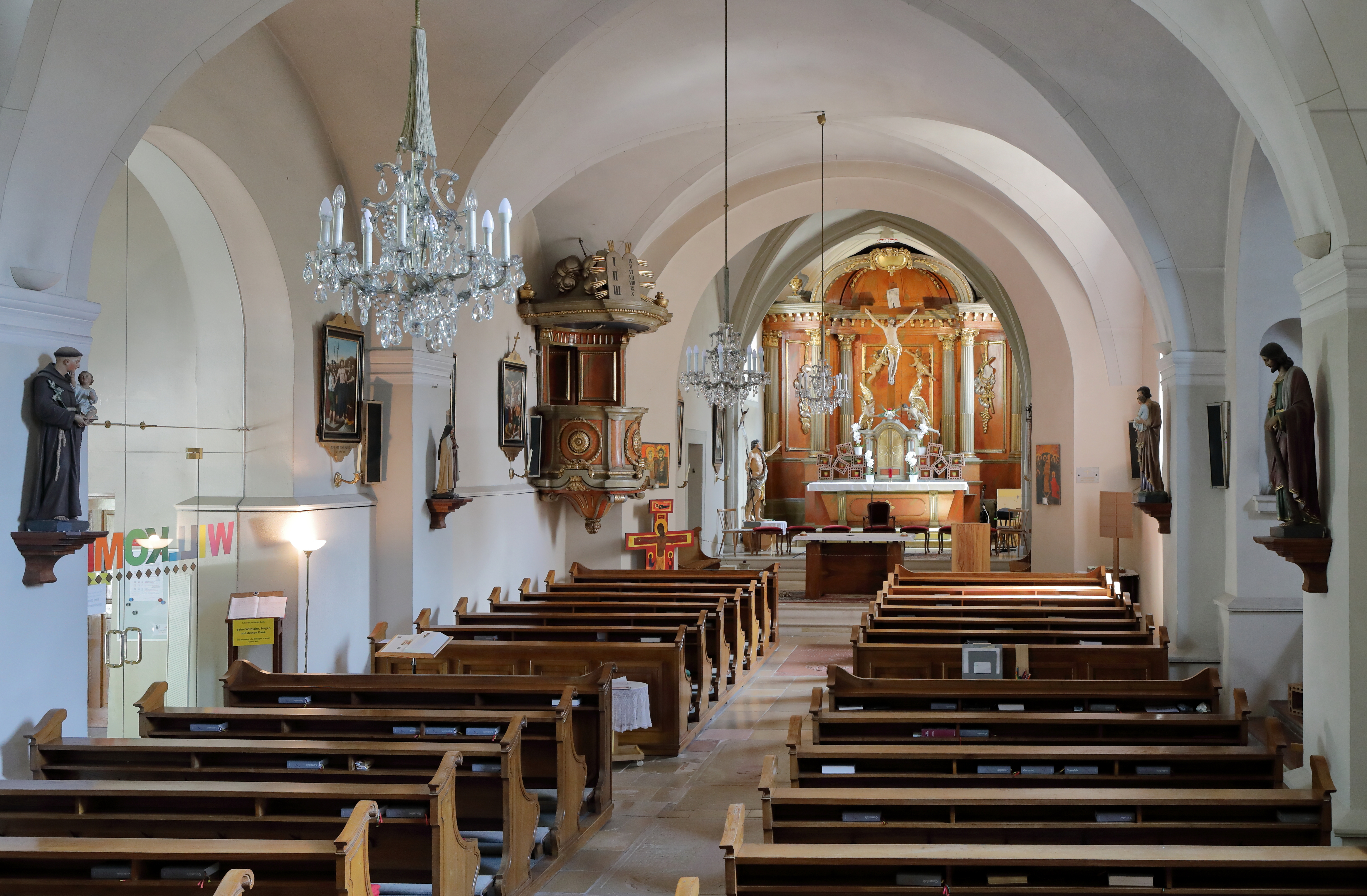 Innenansicht der röm.-kath. Pfarrkirche hl. Johannes der Täufer in Mannswörth, ein Ortsteil der niederösterreichischen Stadtgemeinde Schwechat.